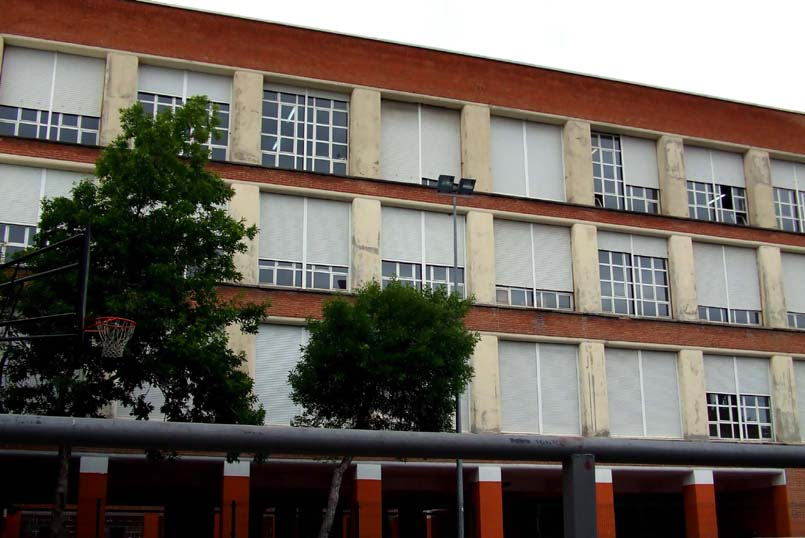 Instituto de Ensino Secundario (IES) "Ramiro de Maeztu". A fotografia amostra uma das asas laterais do edifício, a cual corresponde-se com os laboratórios e as salas. O edifício constroe-se pelos arquitectos Martín Domínguez y Carlos Arniches Moltó no 1930. O proiecto original tem uma clara inspiração racionalista.